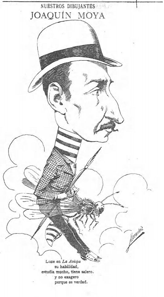 Caricatura de Joaquín Moya, por «Mecachis»